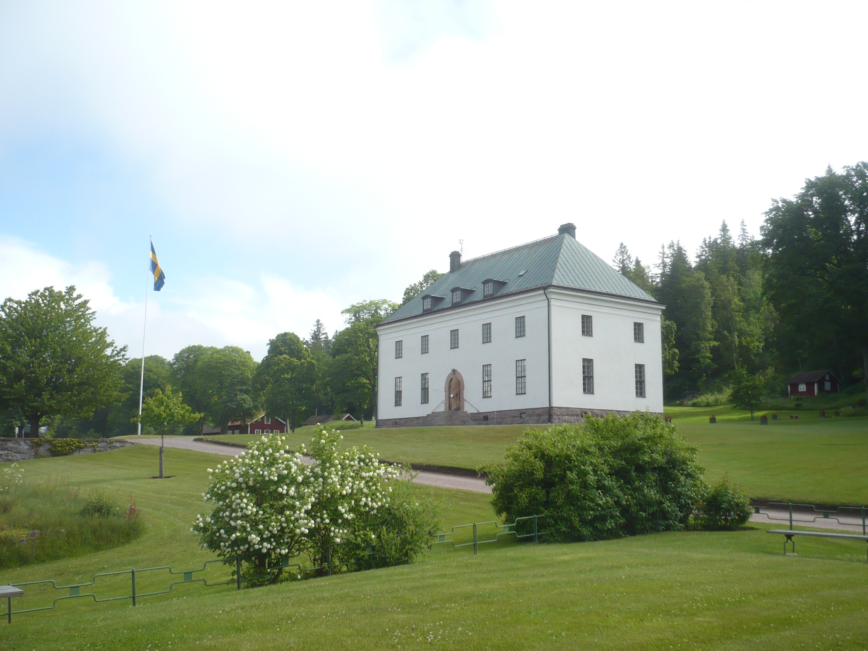 Verner von Heidenstams hus vid Övralid i Östergötland.